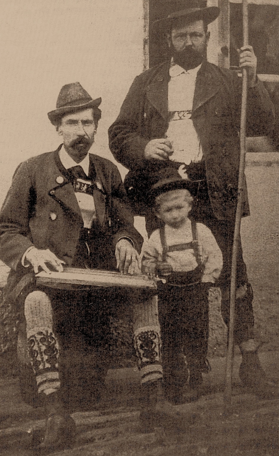 Josef Vogl, assis à gauche avec la cithare, est à l'origine de la renaissance du port de la Lederhose, culotte de cuir, en Allemagne à la fin du XIXème siècle. Photo de 1883.